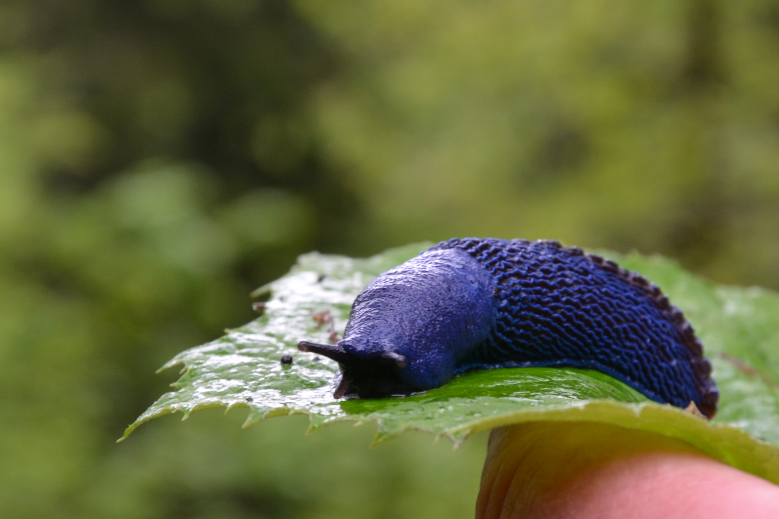 Bielzia coerulans je druh suchozemského plže z čeledi slimákovití